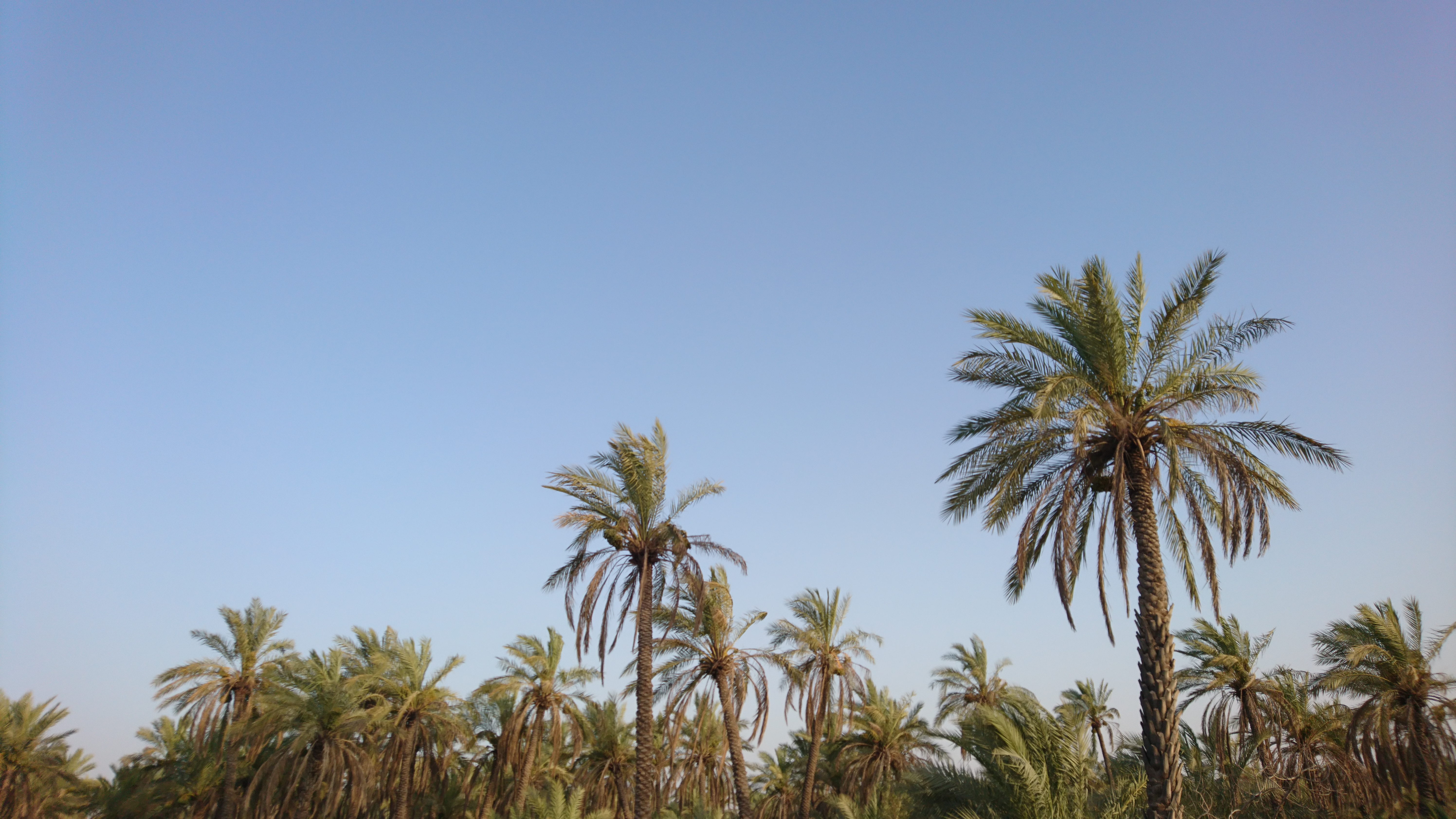 درختان خرما، بهبهان